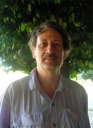 Tom Dillehay en visita a Purén